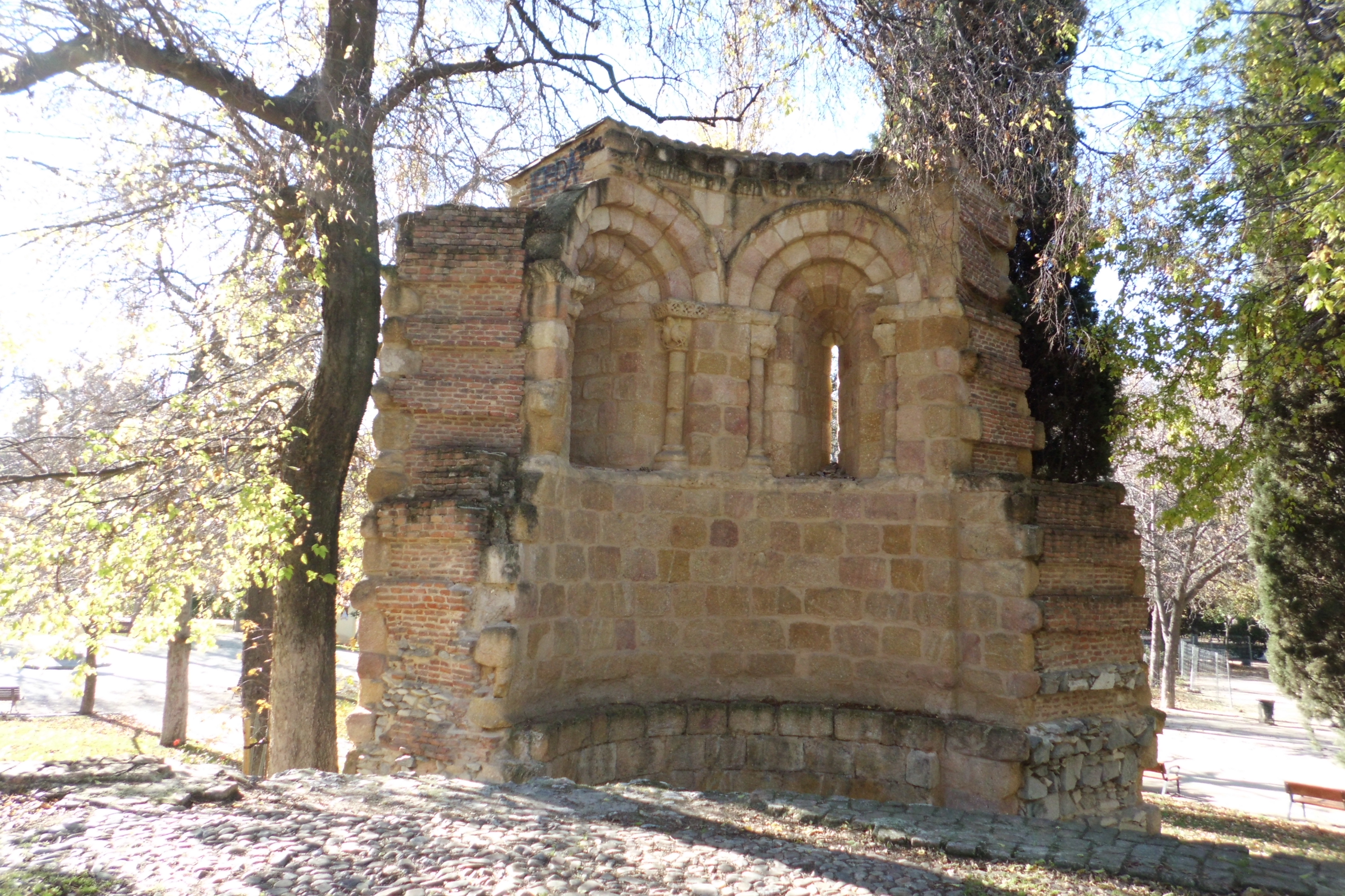 Ruinas de la pequeña iglesia románica de San Pelayo de Ávila, trasladada a Madrid tras la Desamortización de Mendizábal. Están en un lugar de El Retiro de Madrid, cerca de la Montaña Artificial.